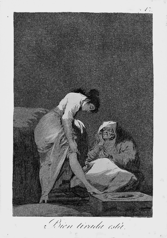 «Bien tirada está» Capricho nº 17 de Goya, serie Los Caprichos